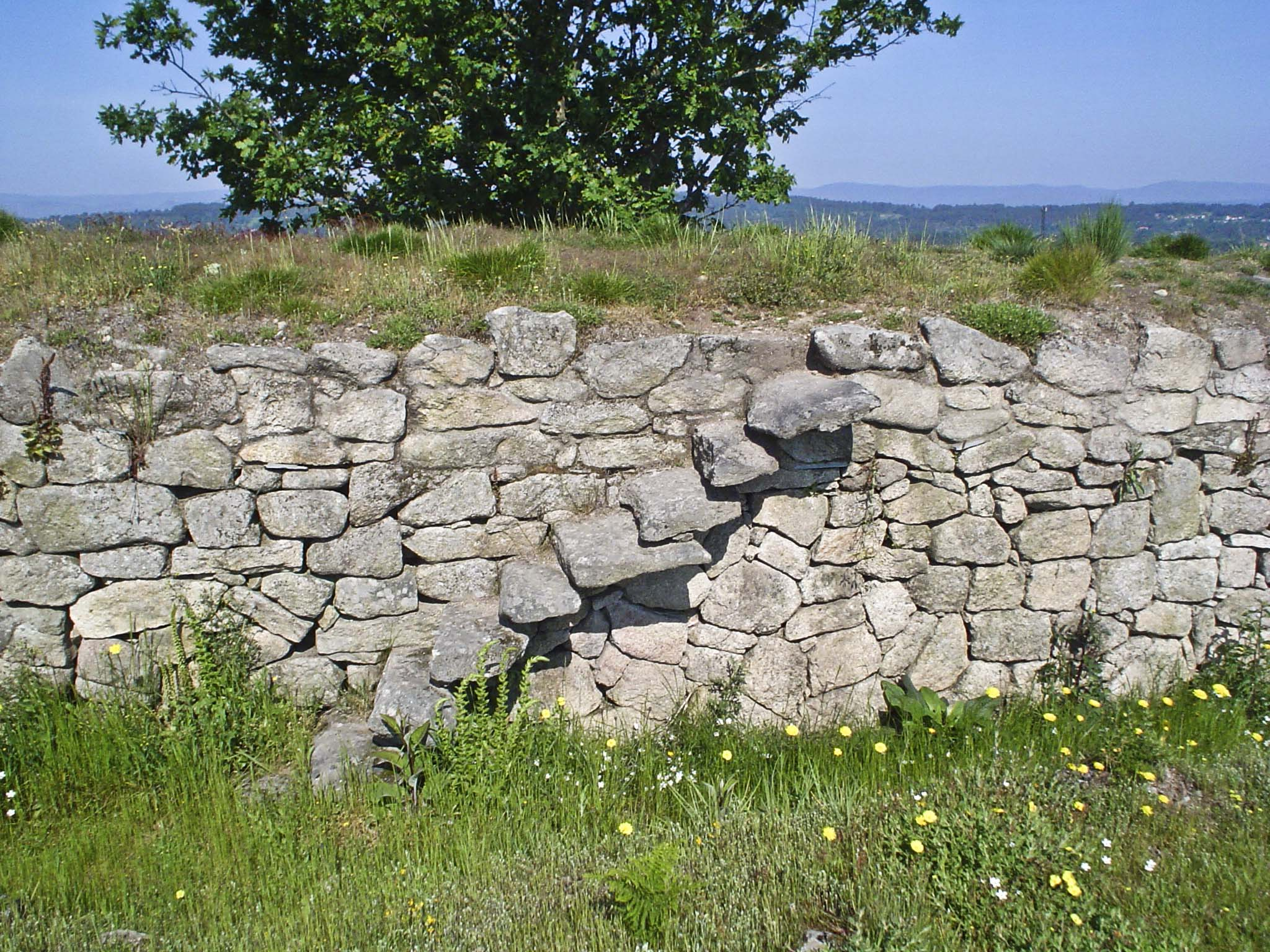 Escada volada de acceso á muralla da croa do Castro de San Cibrao de Las